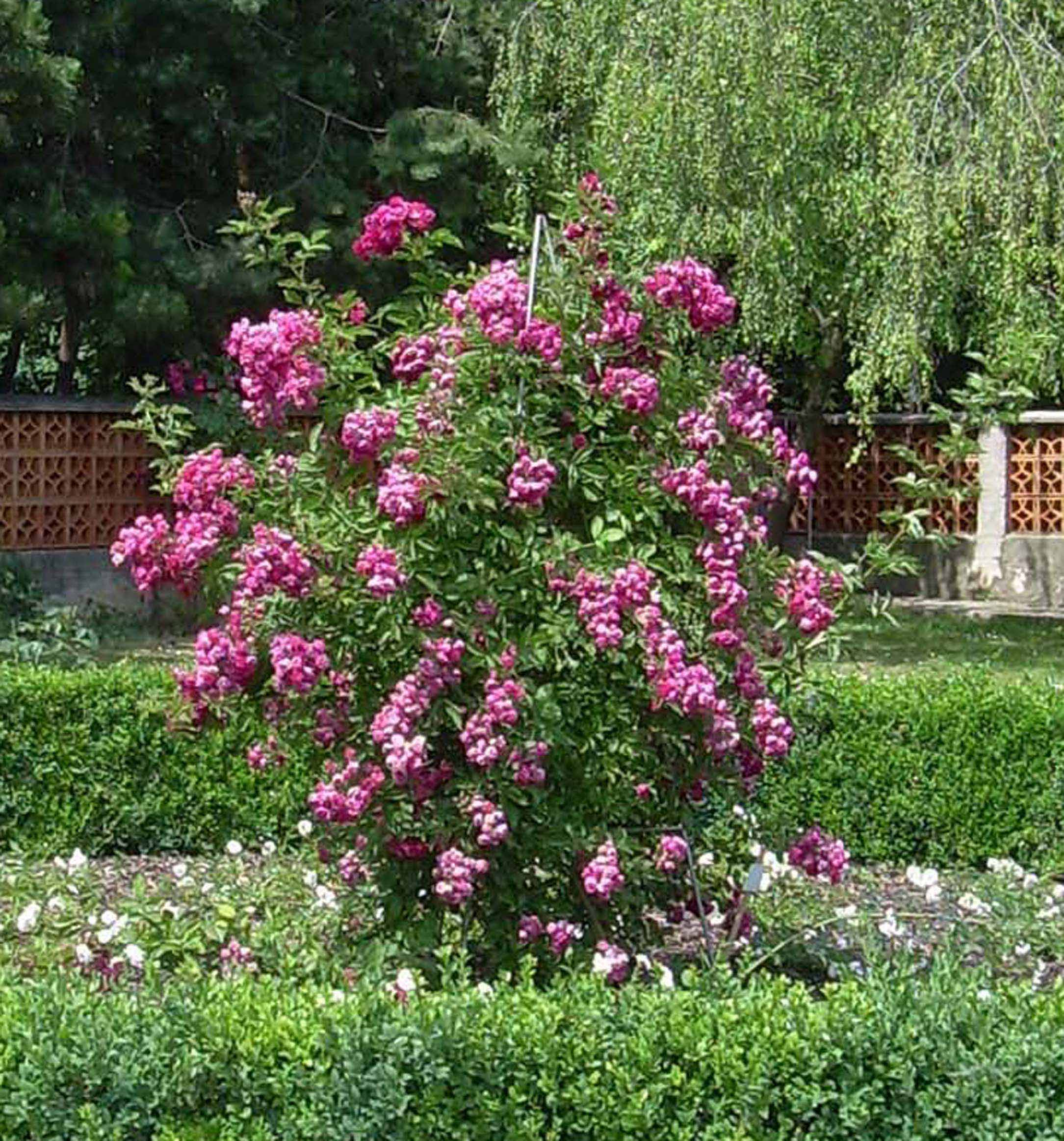 Marie Heriette Gräfin Chotek-Lambert 1911